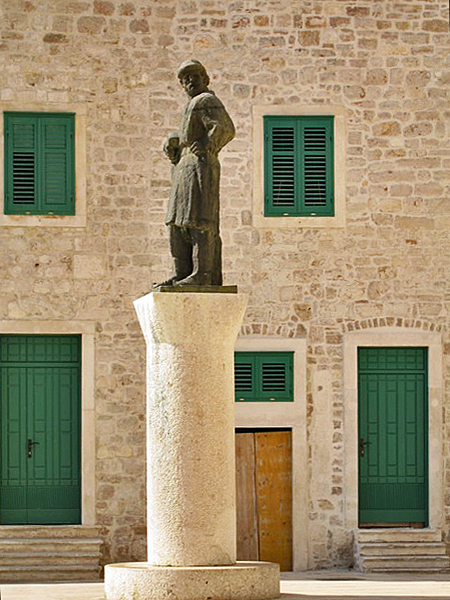 Statue of Juraj Dalmatinac by Ivan Meštrović